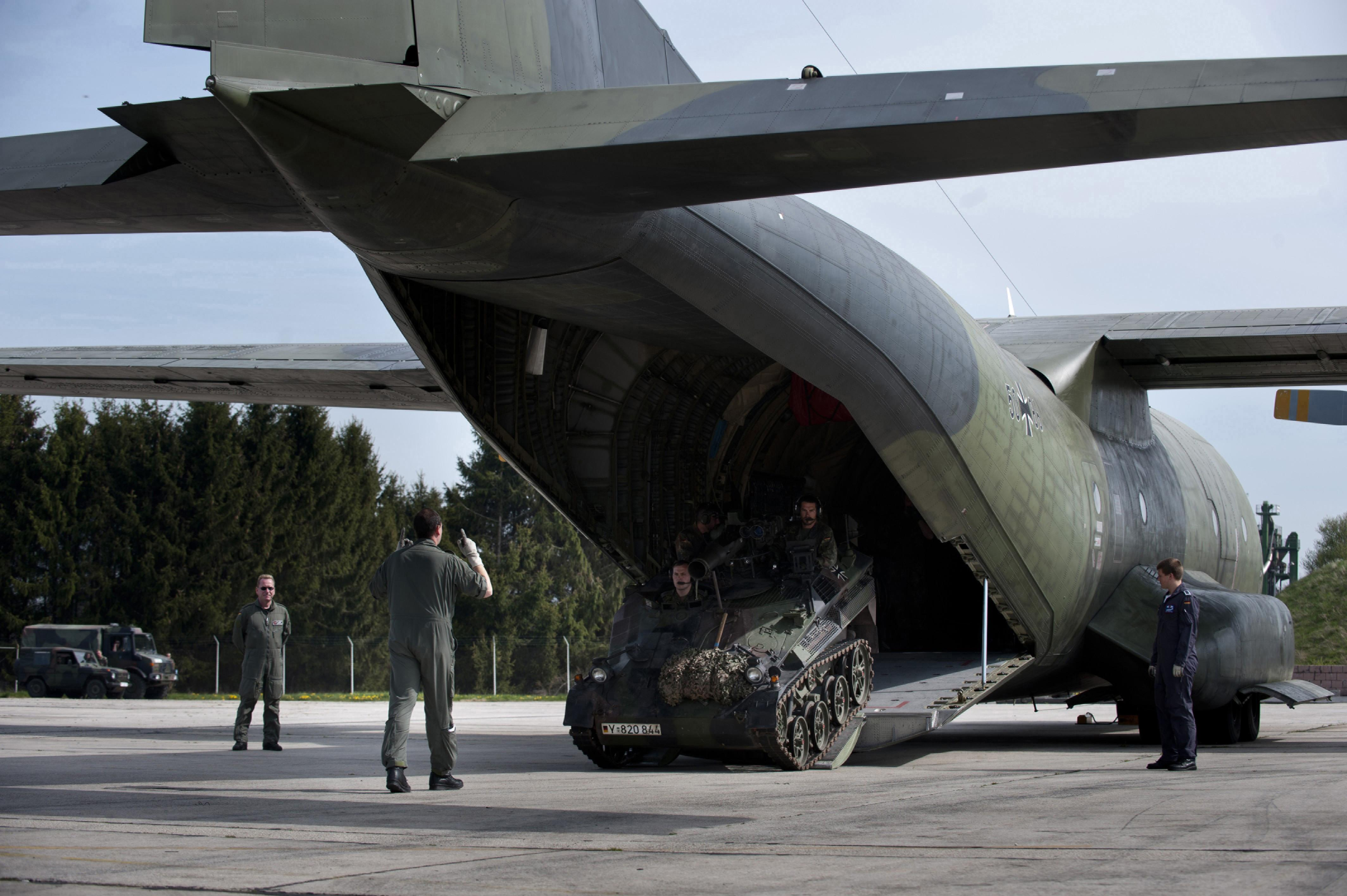 Ein Waffenträger Wiesel wird in eine Transall verladen. ©Bundeswehr/Stollberg.